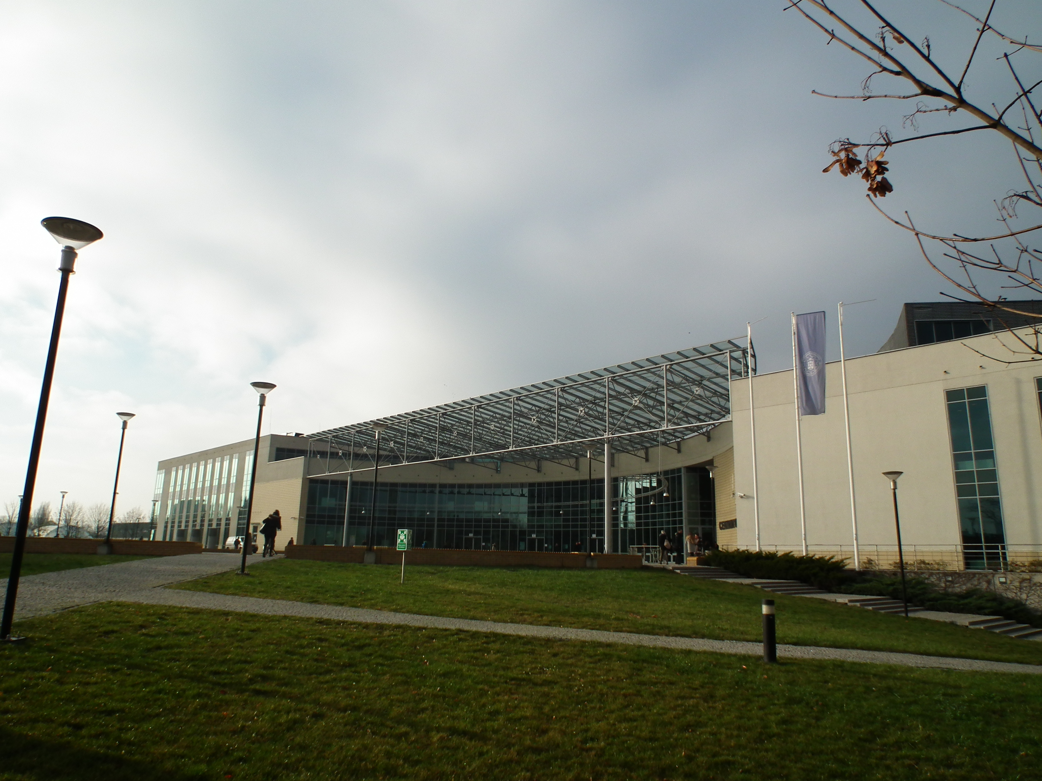 Centrum Wykładowo-Konferencyjne Politechniki Poznańskiej na Piotrowie.